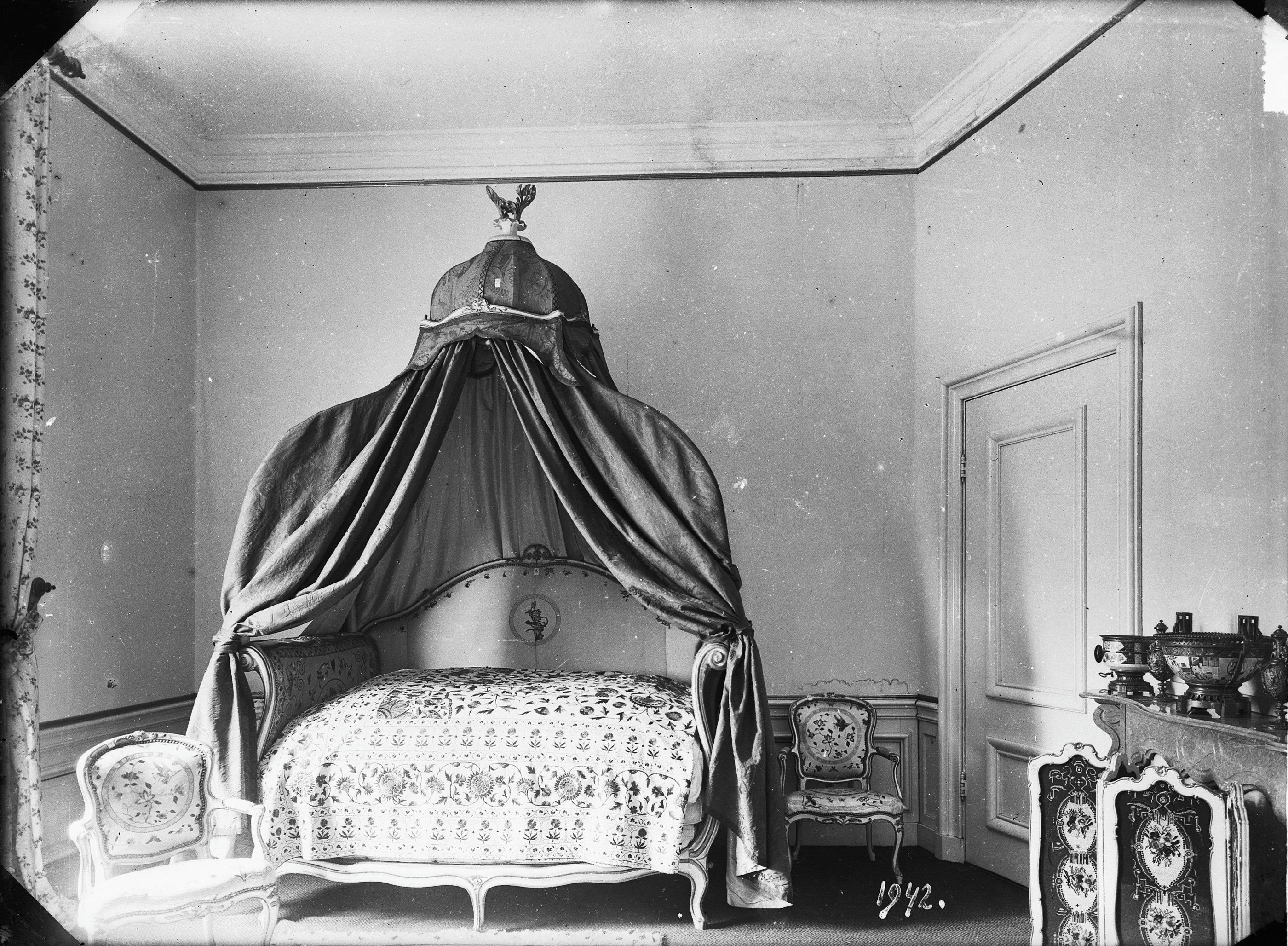 Huis ten Bosch: bed